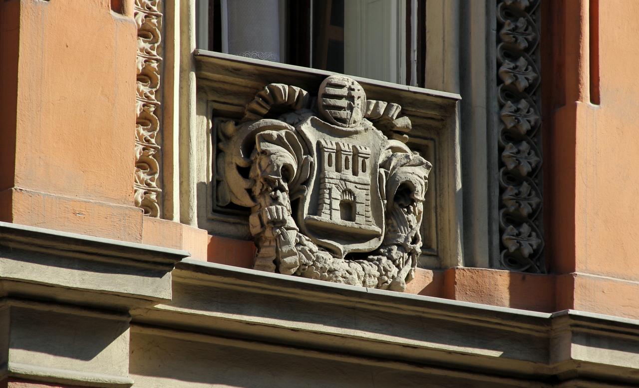 Buda címere - disz egy Vízivárosi házon (Fő utca 3.)